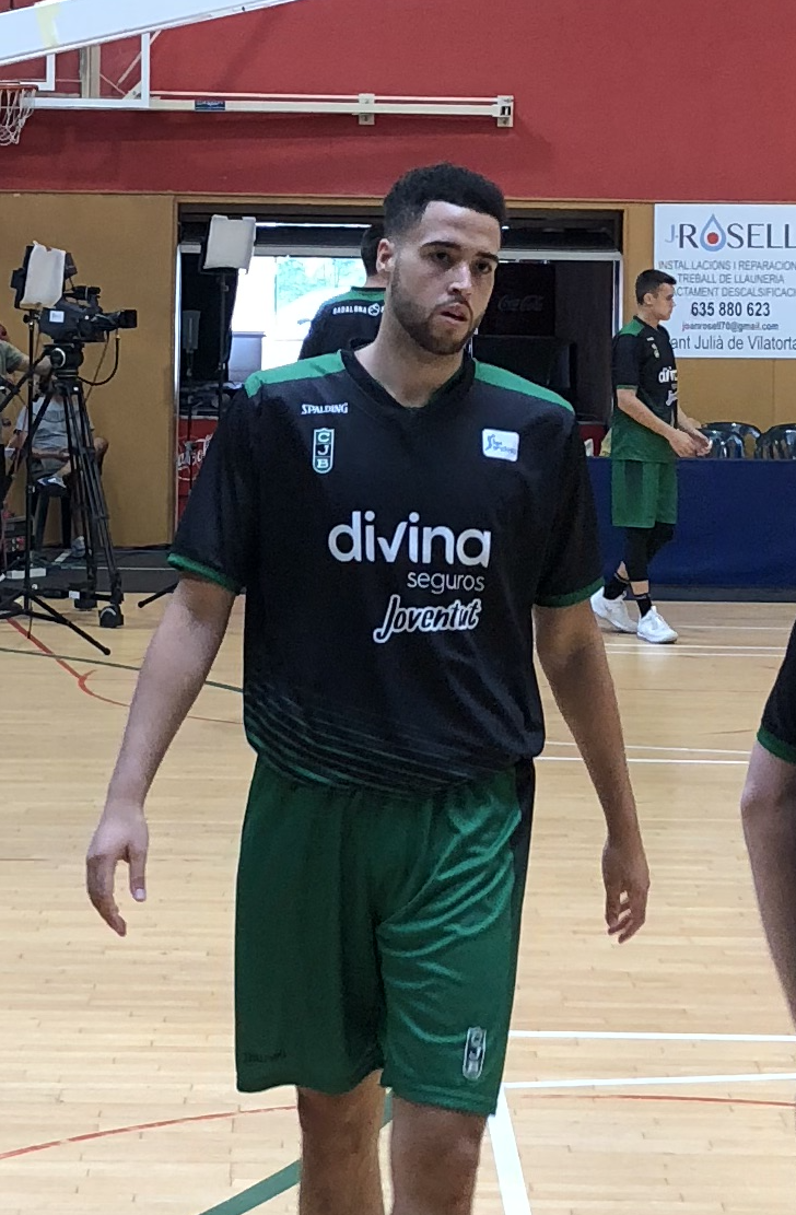 Terrence Bieshaar, jugador del Club Joventut Badalona en un partit de pretemporada a Sant Julià de Vilatorta.